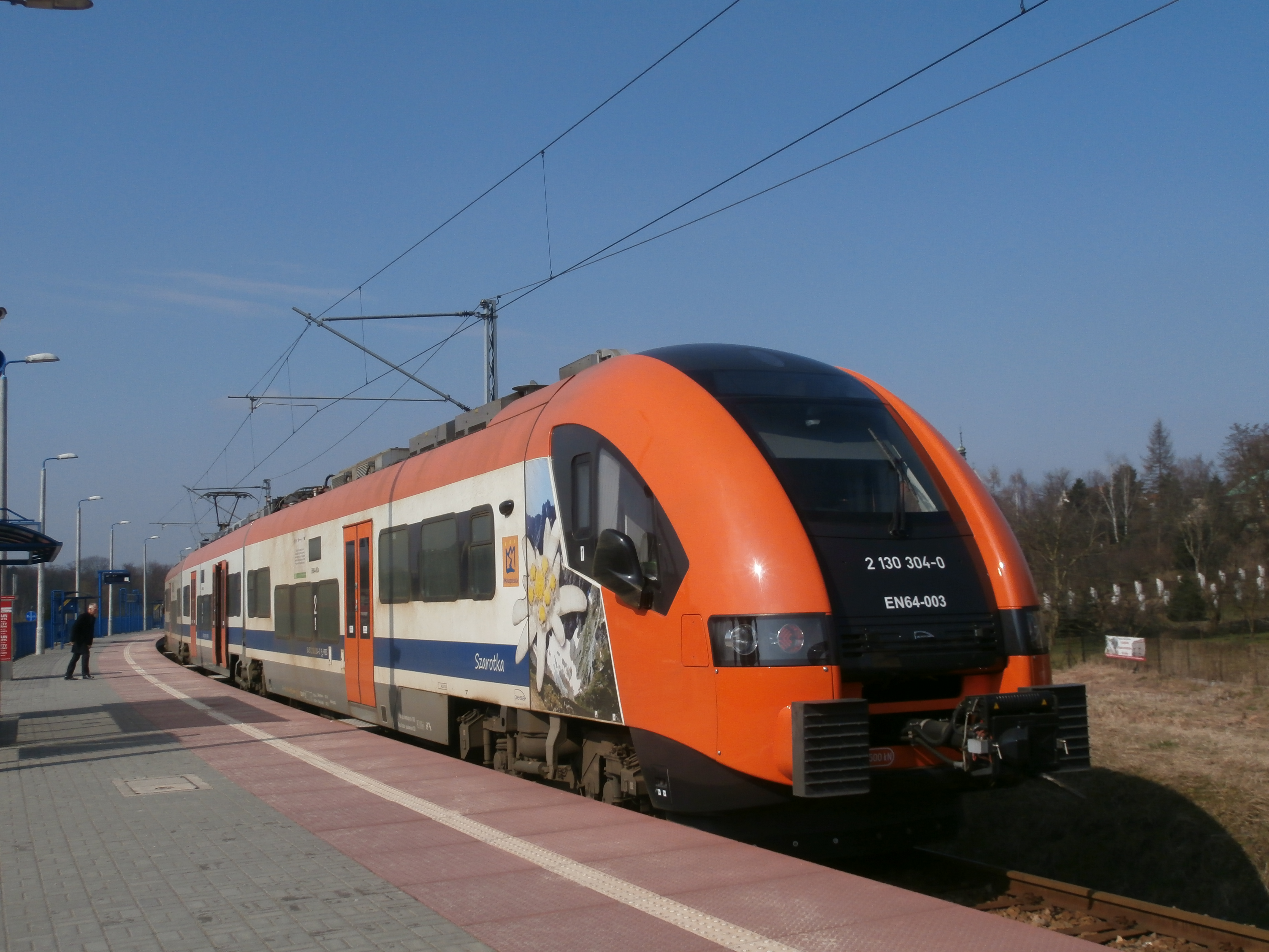 Pesa Acatus Plus należąca do Kolei Małopolskich na linii Kraków Główny-Wieliczka Rynek. W Przyszłości tego typu wagody będą obsługiwać Krakowską Szybką Kolej Miejską do Wieliczki, Skawiny, Krzeszowic i na lotnisko.